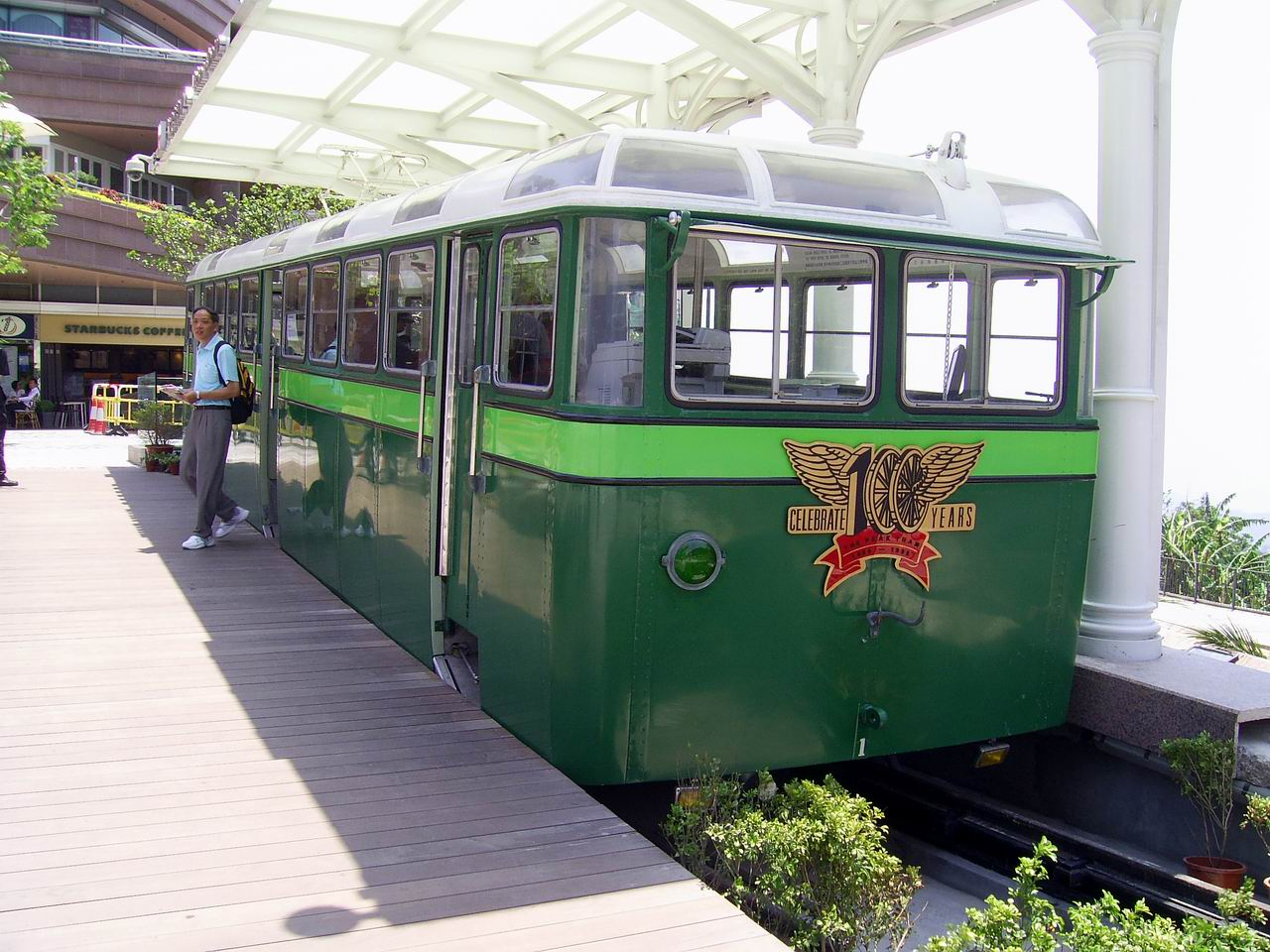 綠色車廂纜車